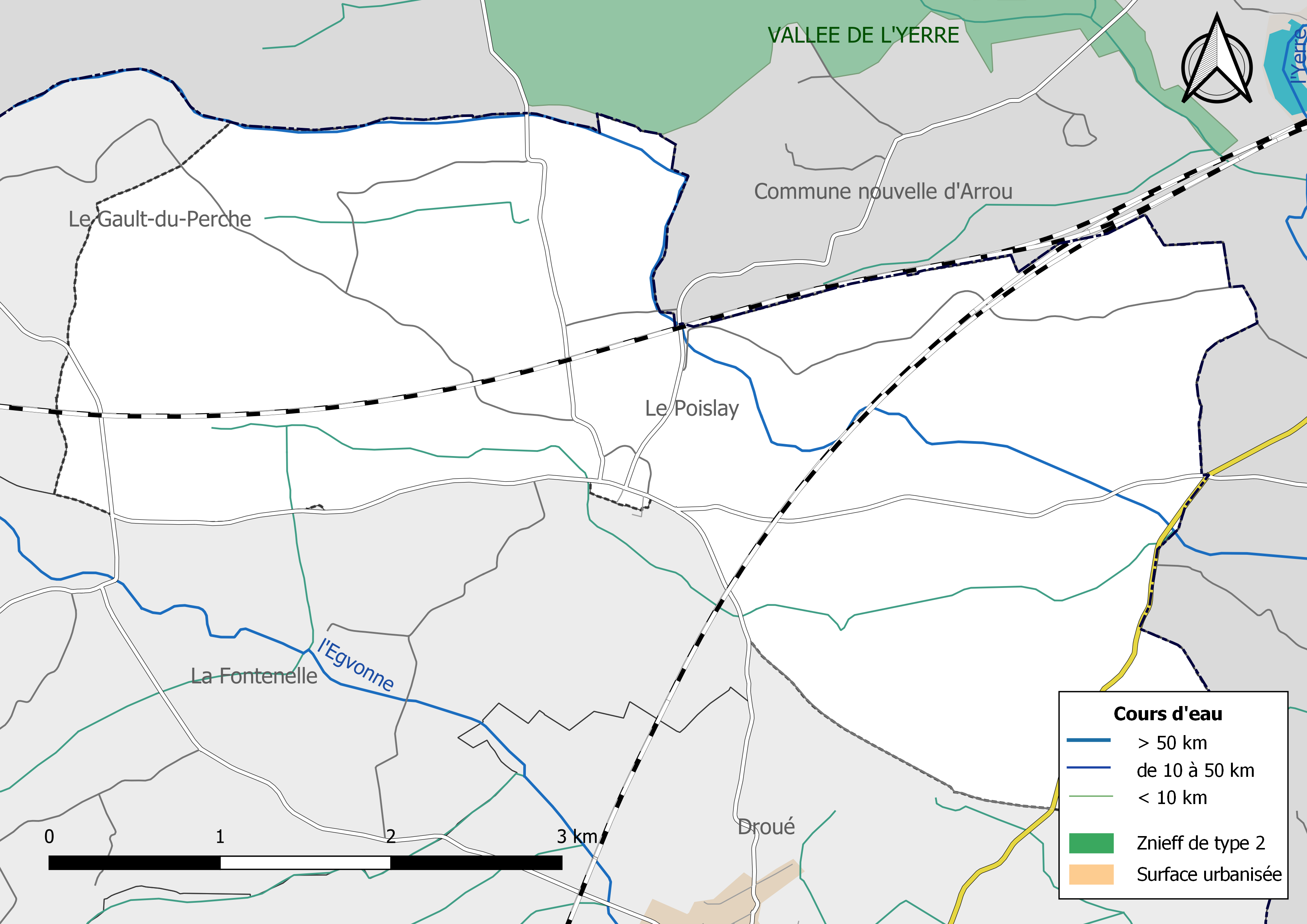 Zones naturelles d'intérêt écologique faunistique et Floristique (ZNIEFF) de type 2 de la commune de Le Poislay. (Loir-et-Cher, France).